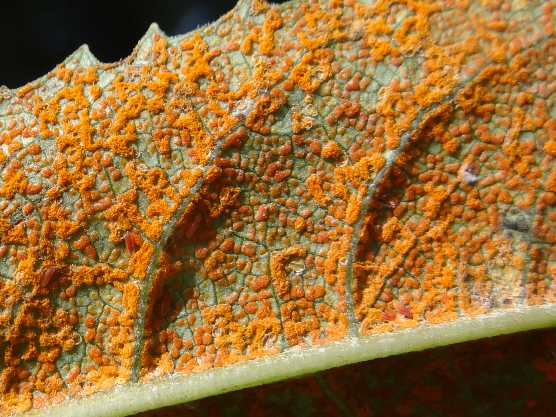 Puccinia glomerata on Senecio sylvestris